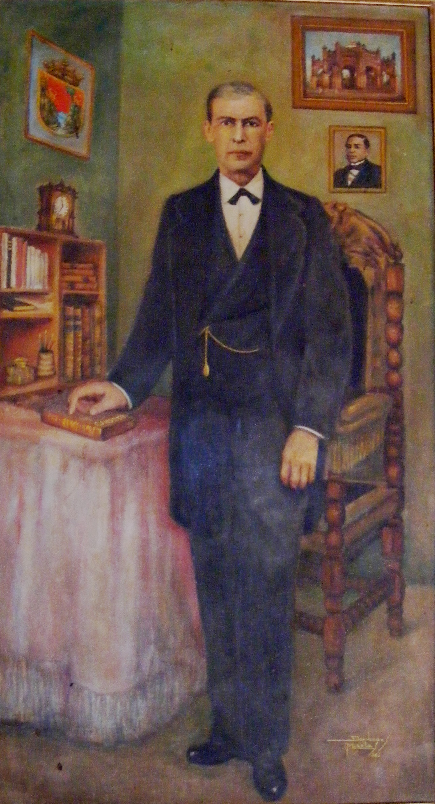 Don Angel Albino Corzo.